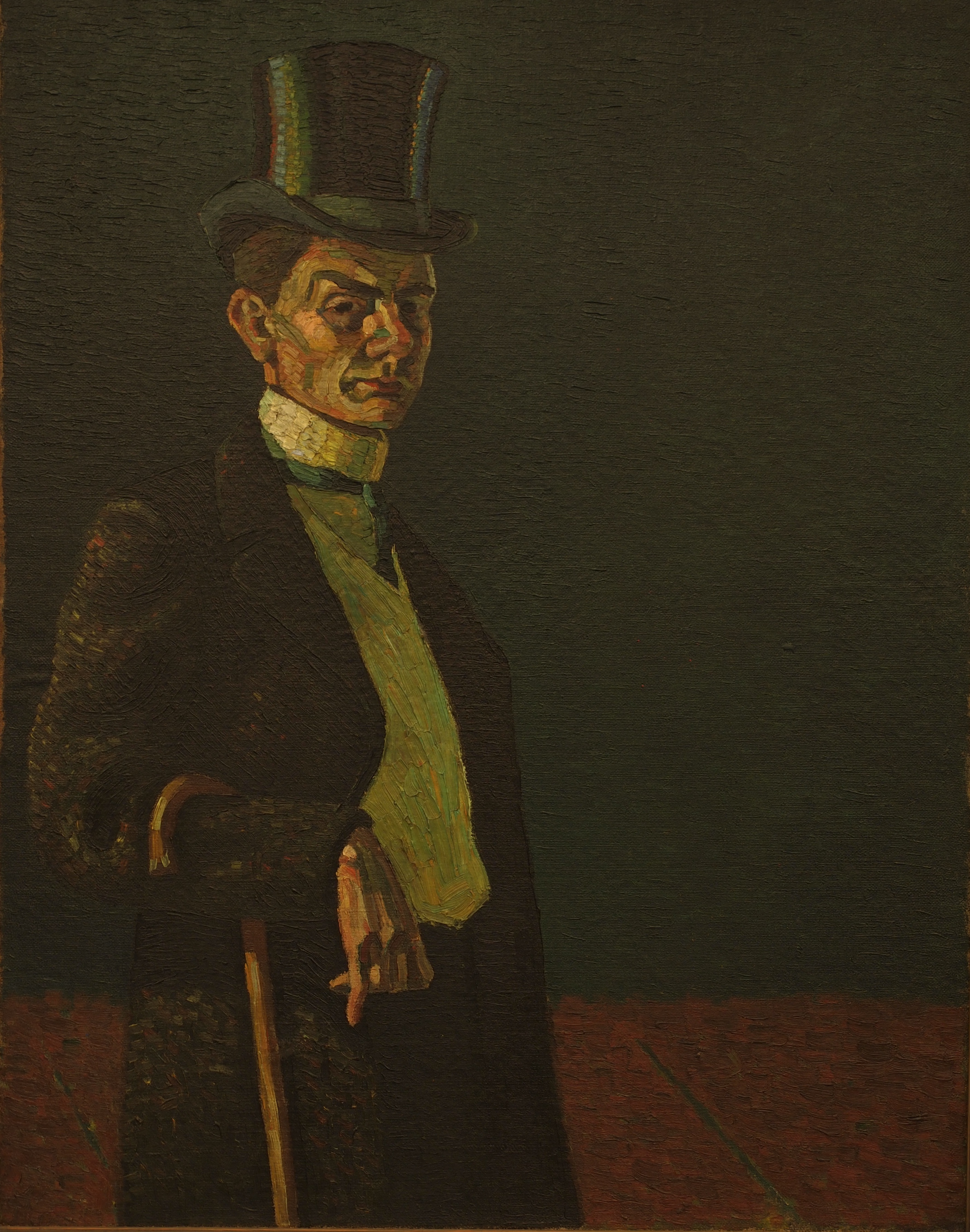 Selbstportrait von Wilhelm Morgner (1891 - 1917), ausgestellt im Wilhelm-Morgner-Haus in Soest, fotografiert anlässlich des 30. Wikipediastammtisches Sauerland